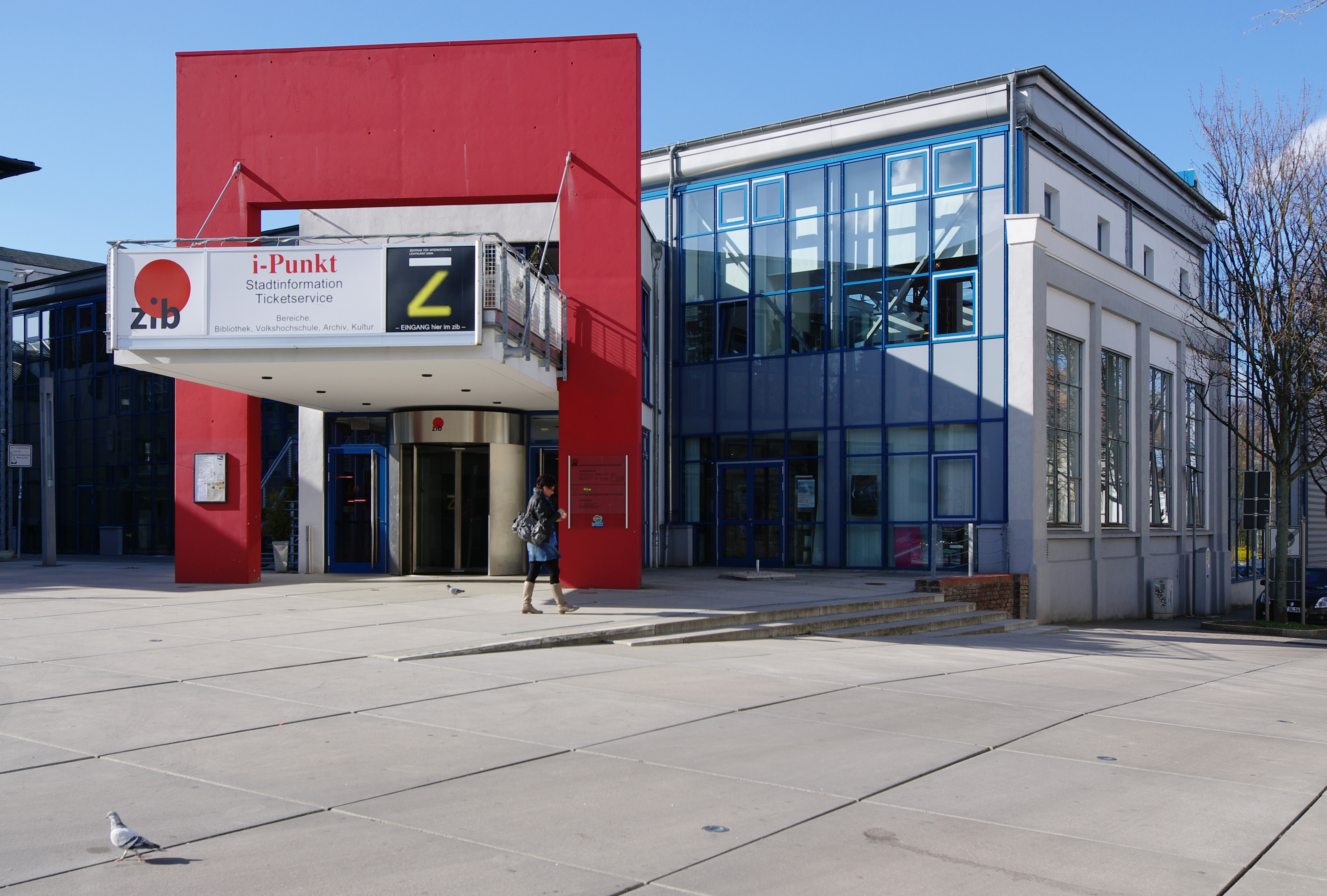 ZIB Unna